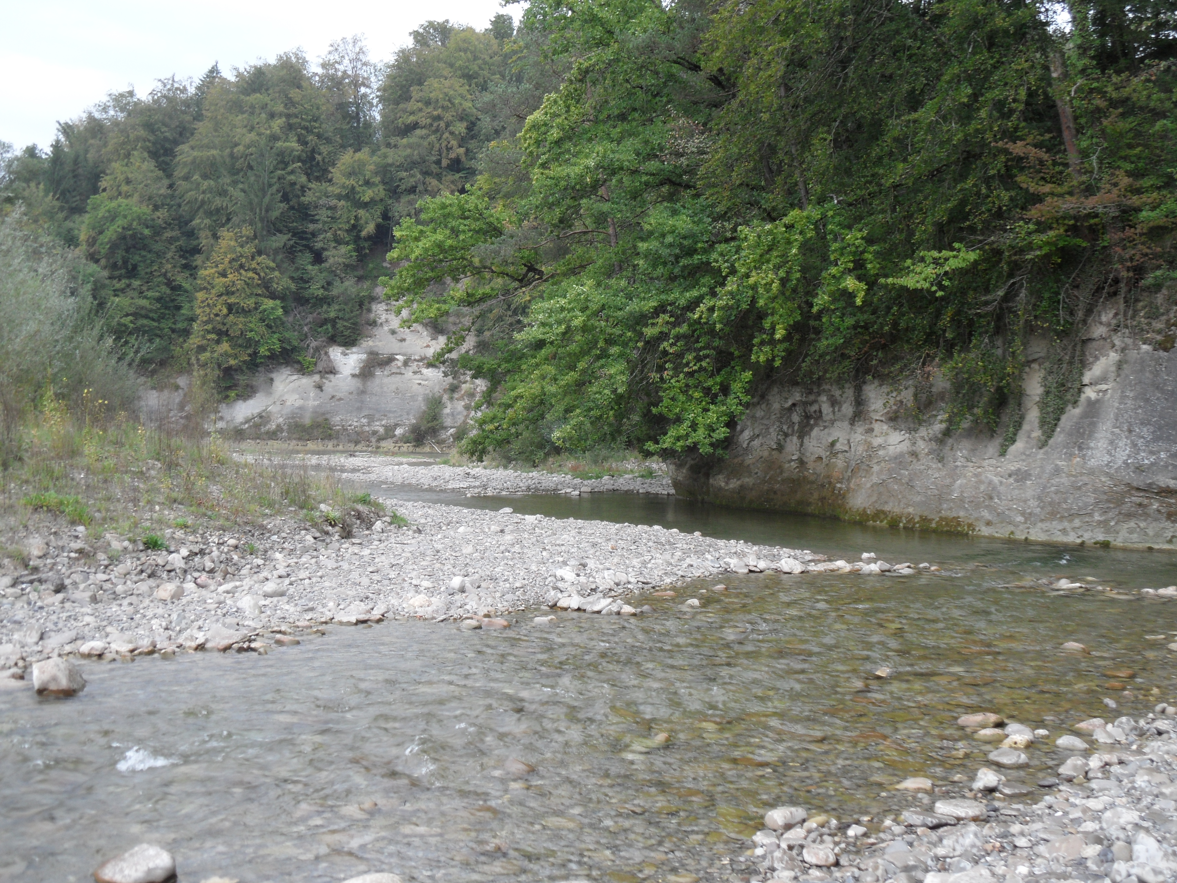 Embouchure de la Gérine dans la Sarine au lieu-dit Au Port à Marly, canton de Fribourg en Suisse.